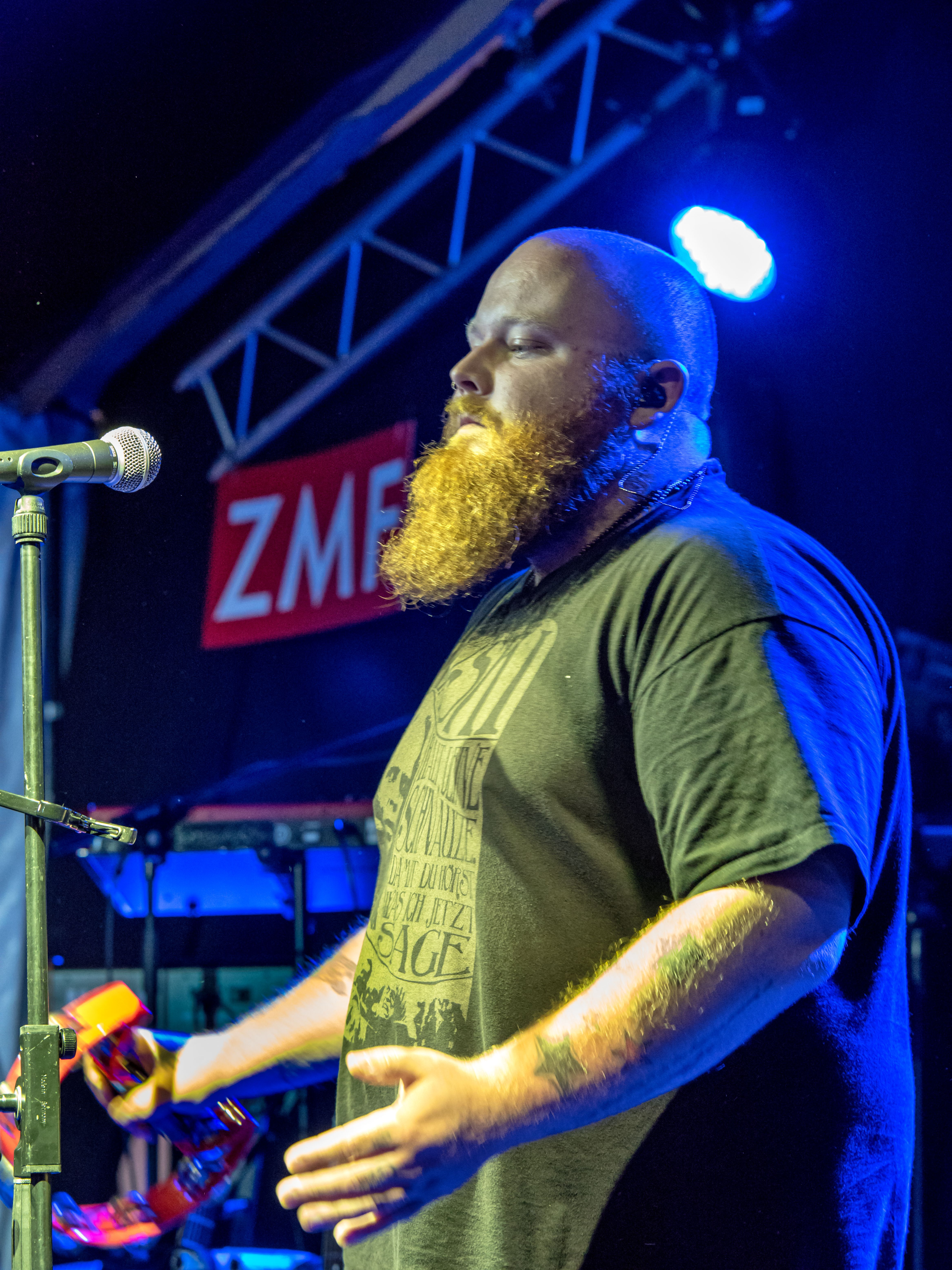 Bilder vom Zelt Musik Festival 2016 in Freiburg im Breisgau Andreas Kümmert